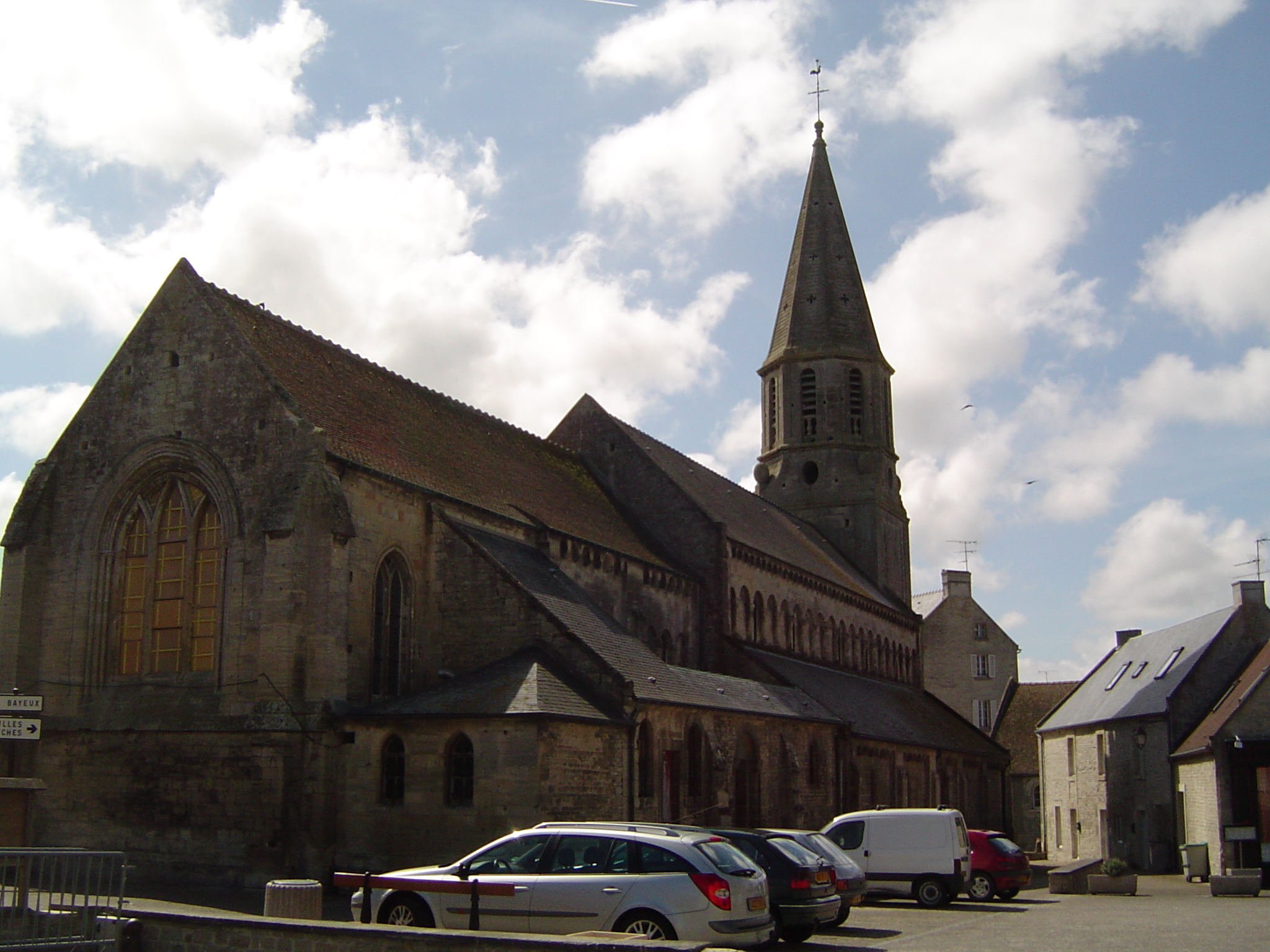 église de Creully dans le Calvados en 2005.